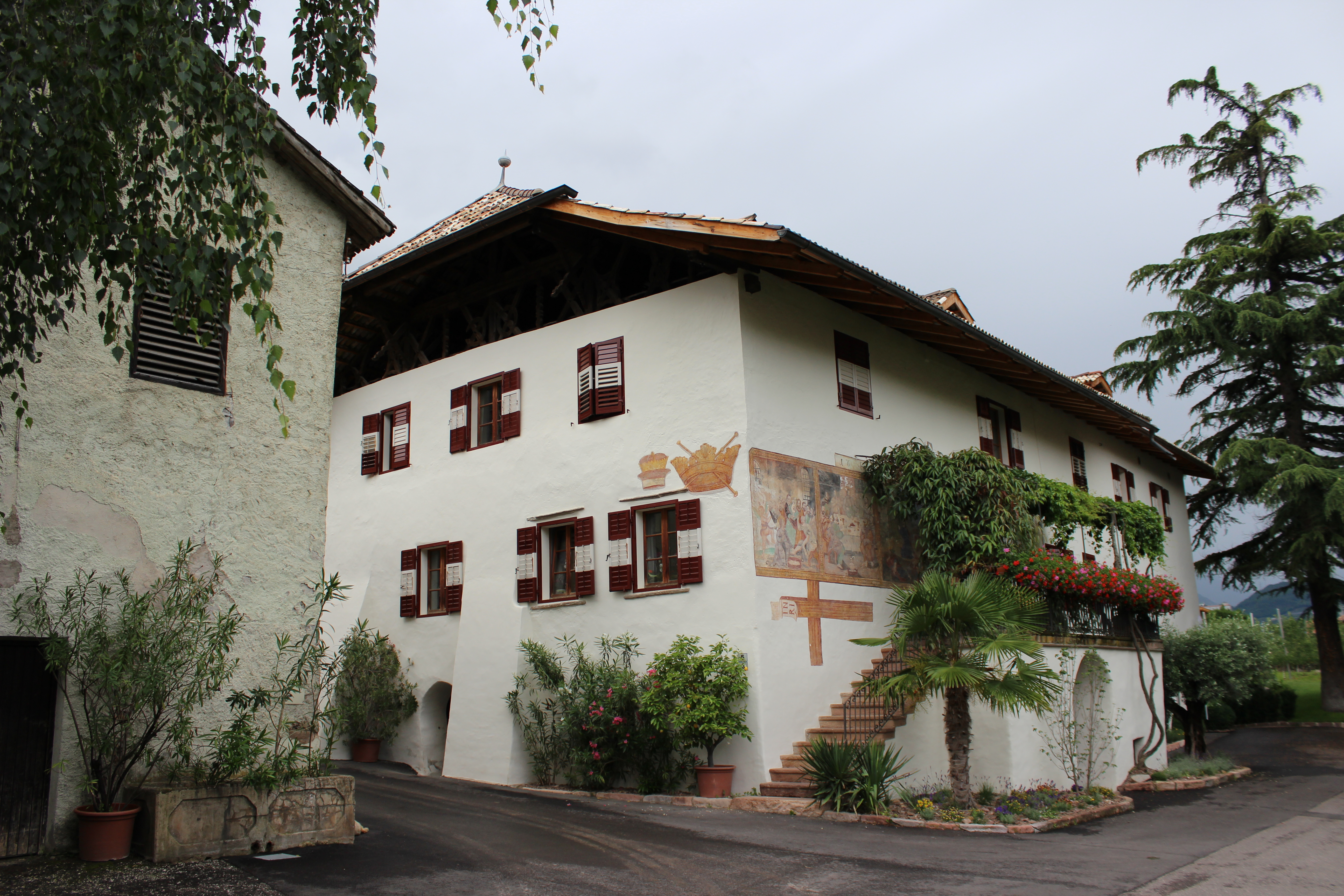 Sternbauer in Andrian - mit Stadel